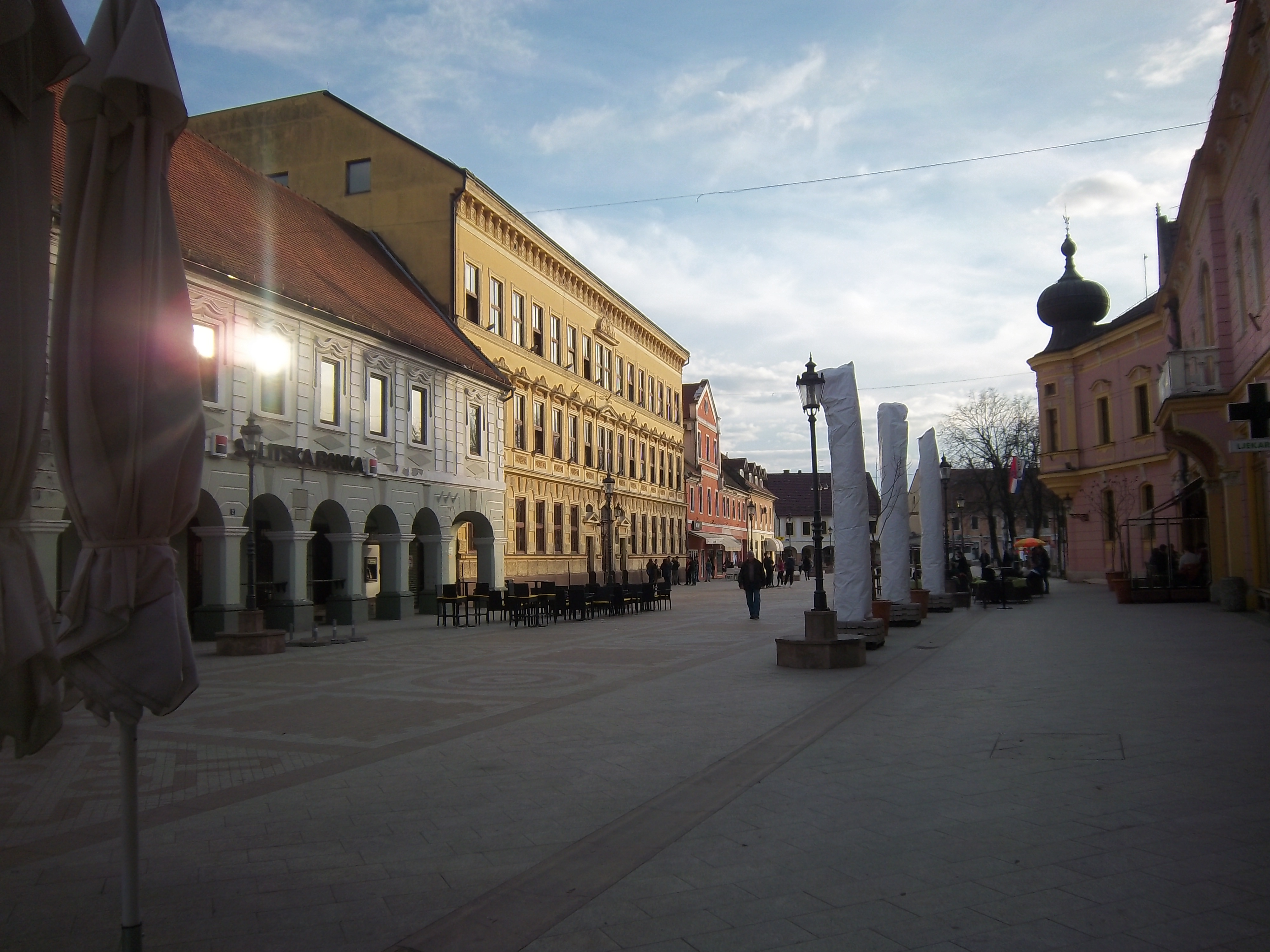 Srpskohrvatski / српскохрватски: Vinkovci u istočnoj Hrvatskoj (centar).